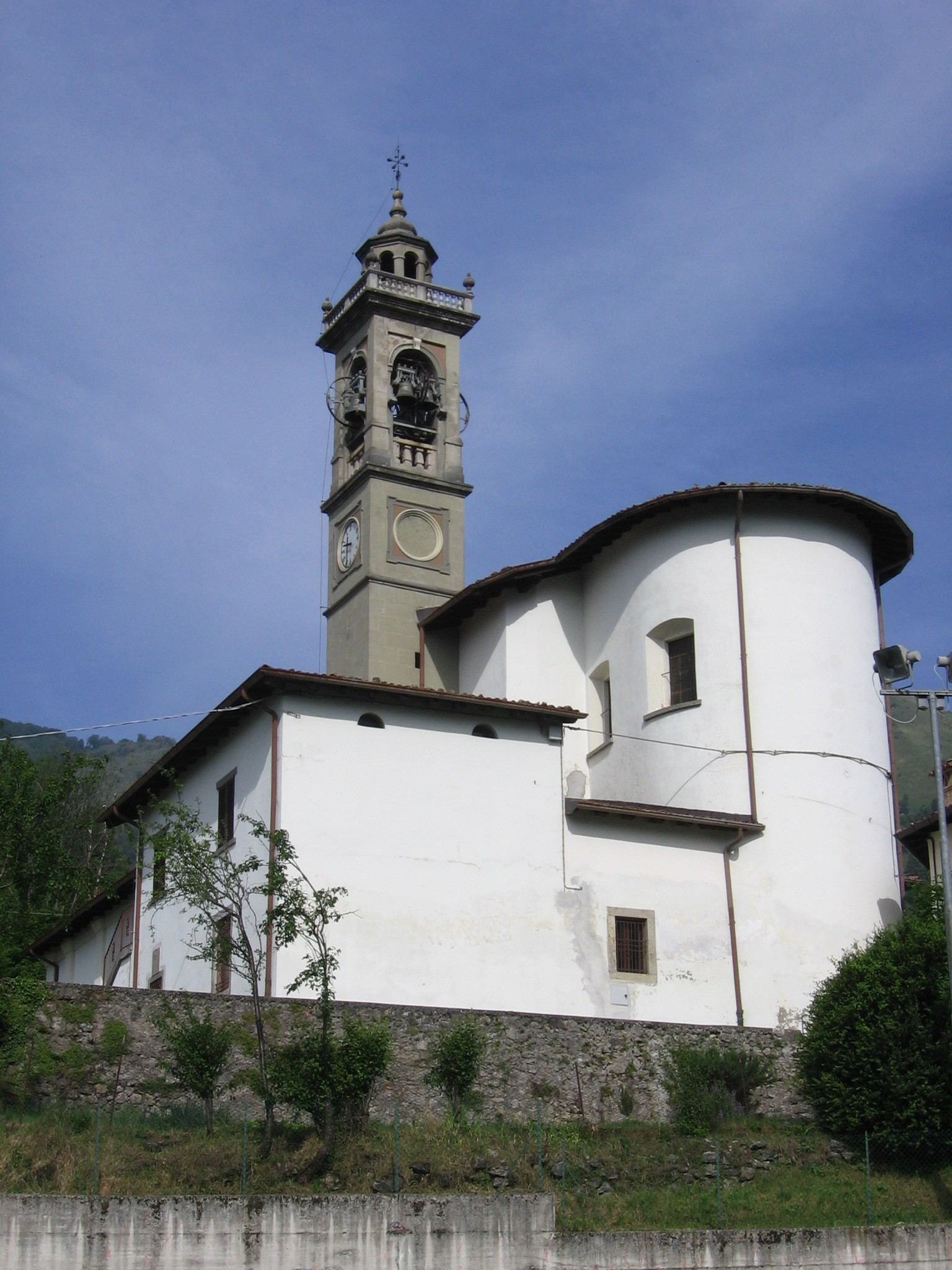 chiesa fraz. Lepreno, Serina, Bergamo, Italia